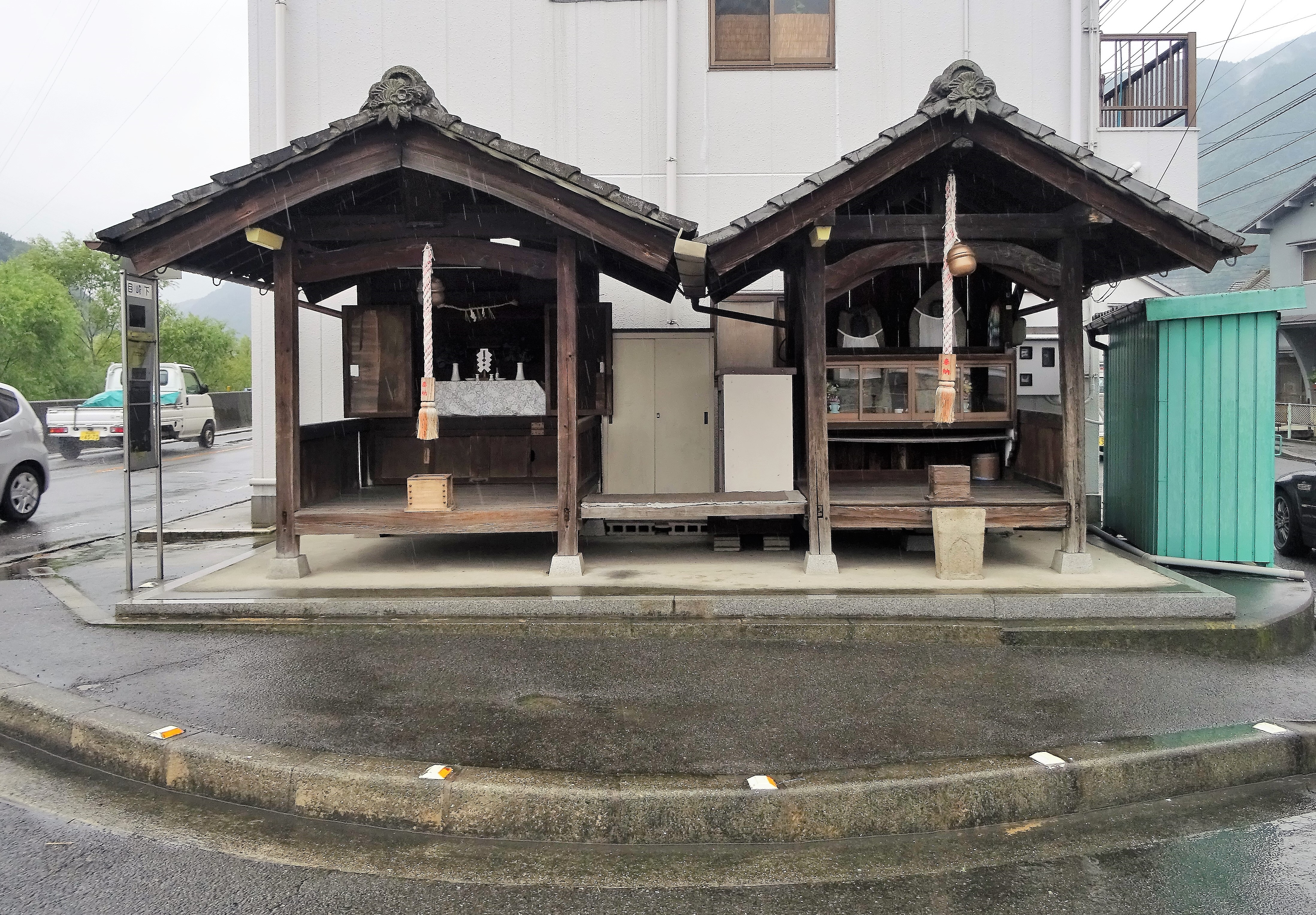 憩亭。別名、辻堂または四つ堂。広島県府中市目崎町。神棚（左側）と地蔵(右側）。 34°34'22.0"N 133°13'31.7"E